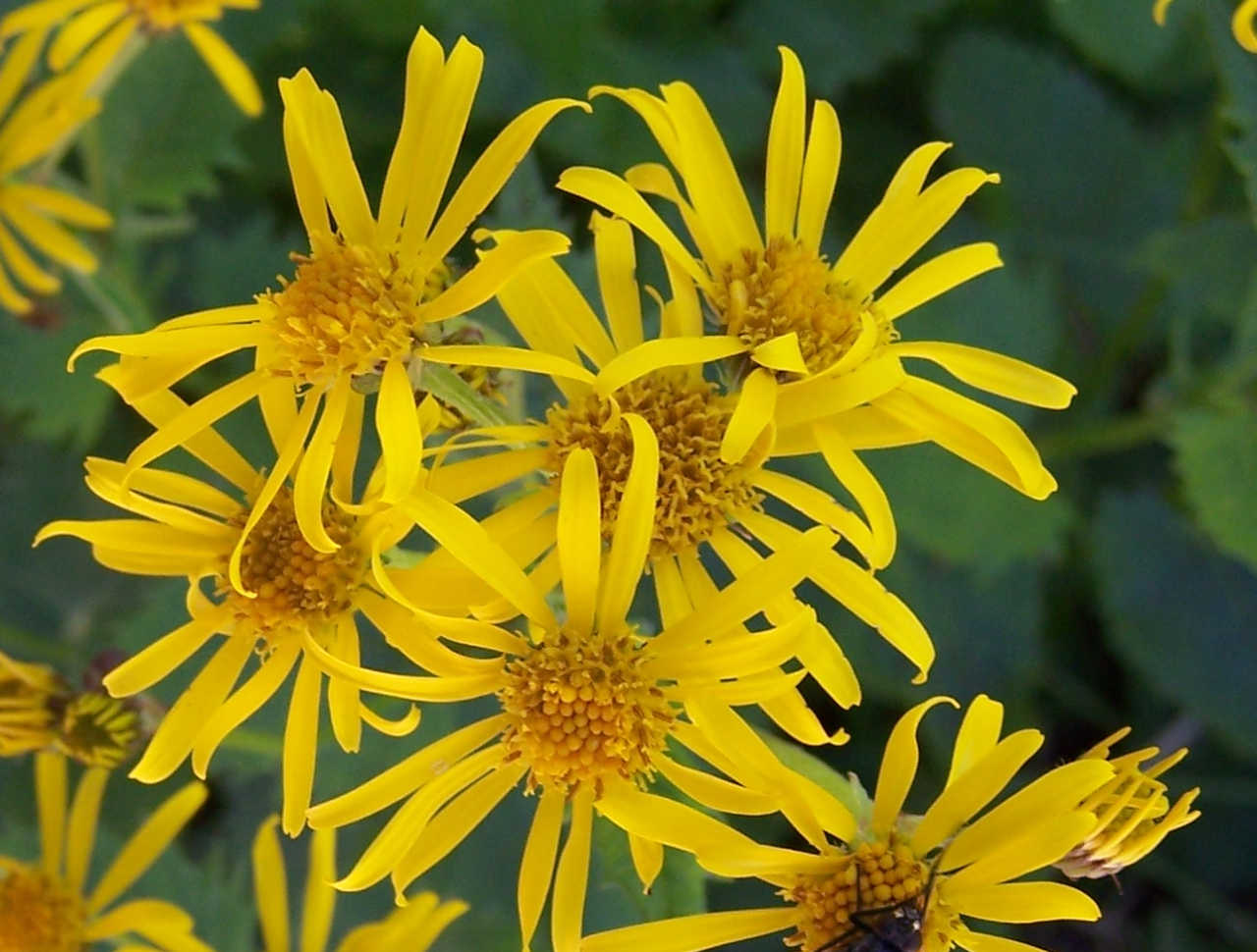 Doronicum austriacum (pl. omieg górski), habitat:Tatra Mountains, Dolina Kondratowa